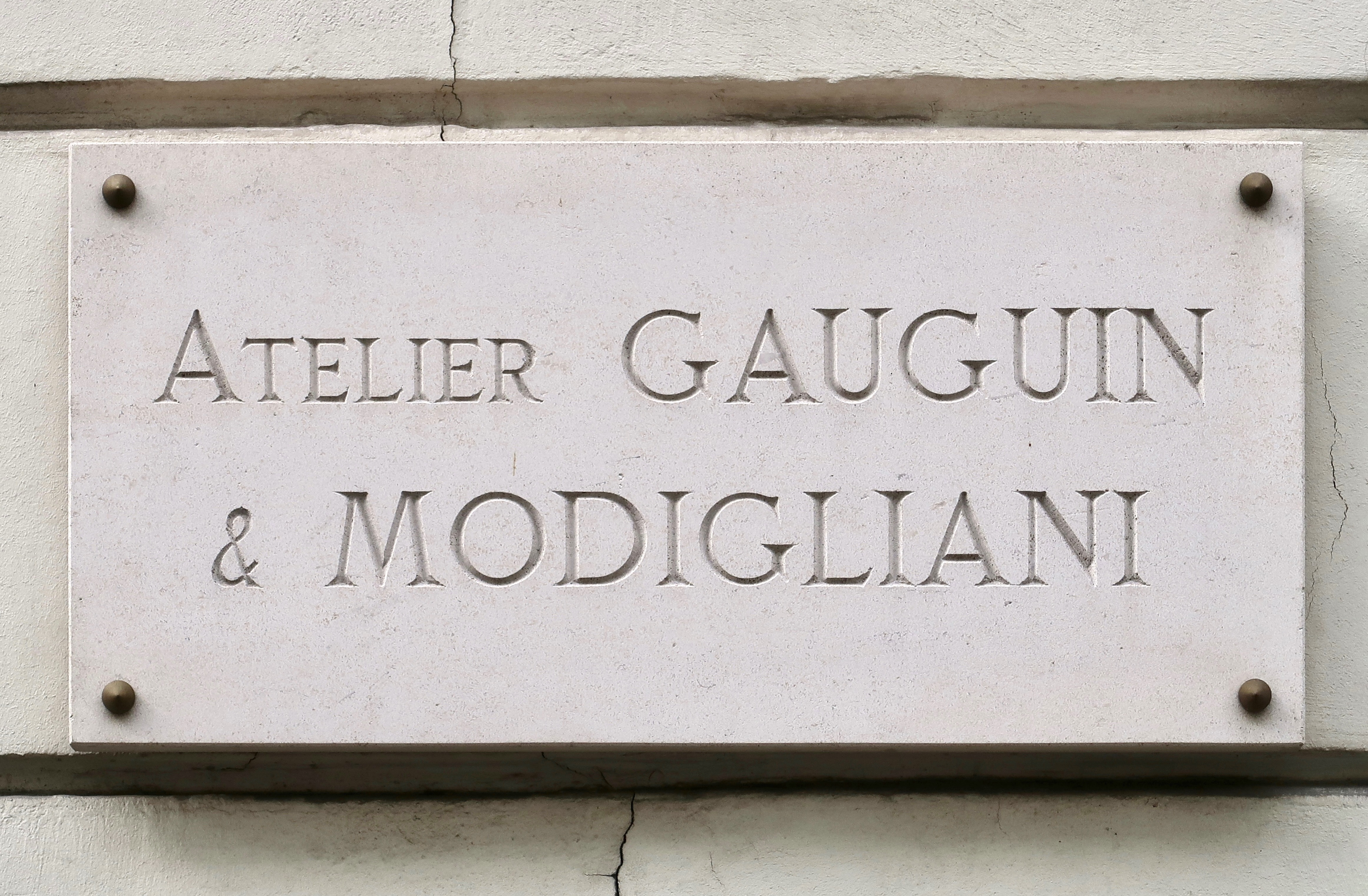 Plaque de l'atelier Gauguin et Modigliani, 8 rue de la Grande-Chaumière (Paris, 6e).